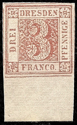 Почтовая марка частной почты Dresdner Verkehrs-Anstalt Hansa (Дрезден). Михель #114